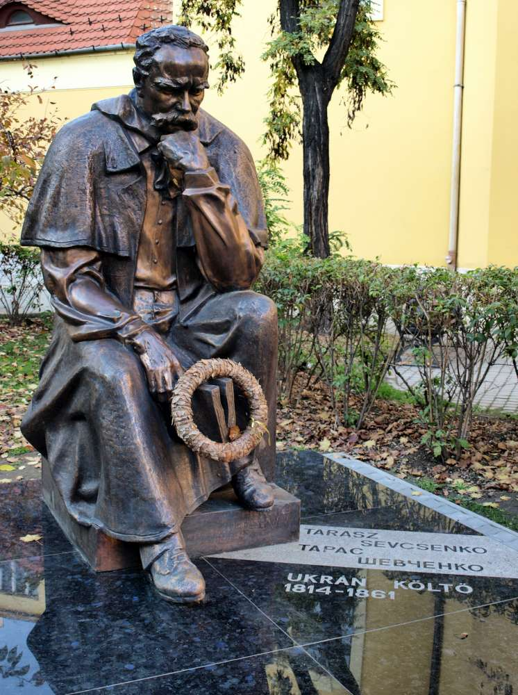 Tarasz Sevcsenko ukrán költő szobra (1814 - 1861). Budapest, II.ker., Ganz u. - Fő u. sarok (a templom mellett). Ivan Mykytyuk alkotása (bronz, 2007)